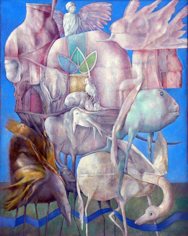 Cathedral sustained by transgenic animals - Oil on canvas 92x73 - 1991